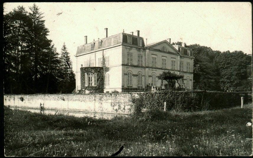 Château du Vernay en Isère en 1890